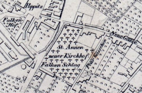 Der neue Annenkirchhof bzw. 2. Annenfriedhof Dresdens auf einer Karte aus dem jahr 1828